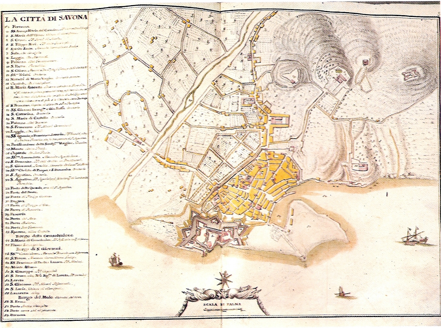 Mappa di Matteo Vinzoni raffigurante Savona e la fortezza del Priamar